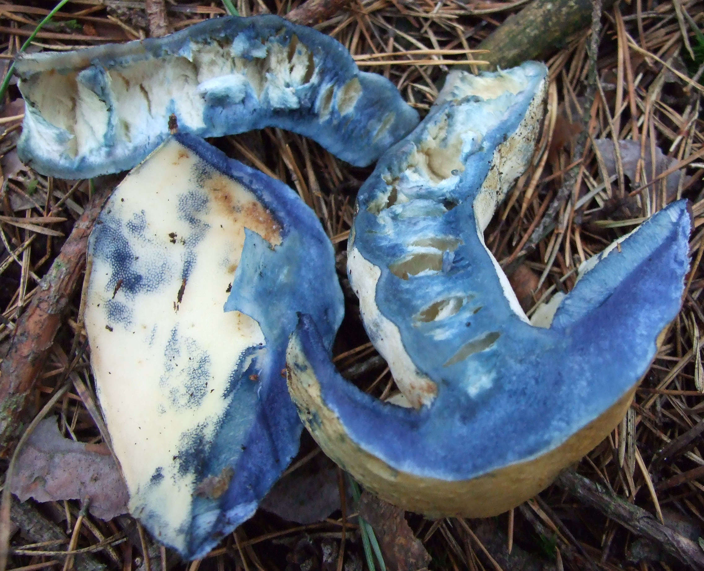 Piaskowiec modrzak, śniak (Gyroporus cyanescens)